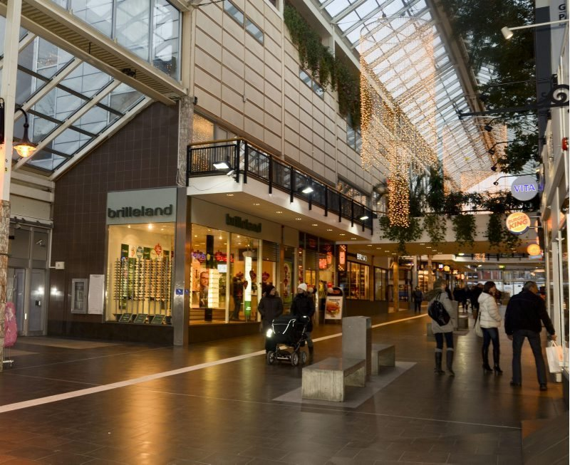 Glasshuset i Bodø.